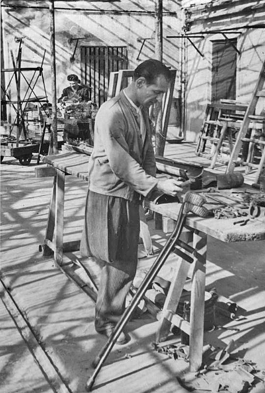 Berlin, Kriegsversehrter Klempner Berlin: Schulgarten Blankenfelde U.B.z.: Ein kriegsversehrter Klempner arbeitet auch in Blankenfelde. Aufn.: Illus/Kümpfel 15. 9. 49 3947-49